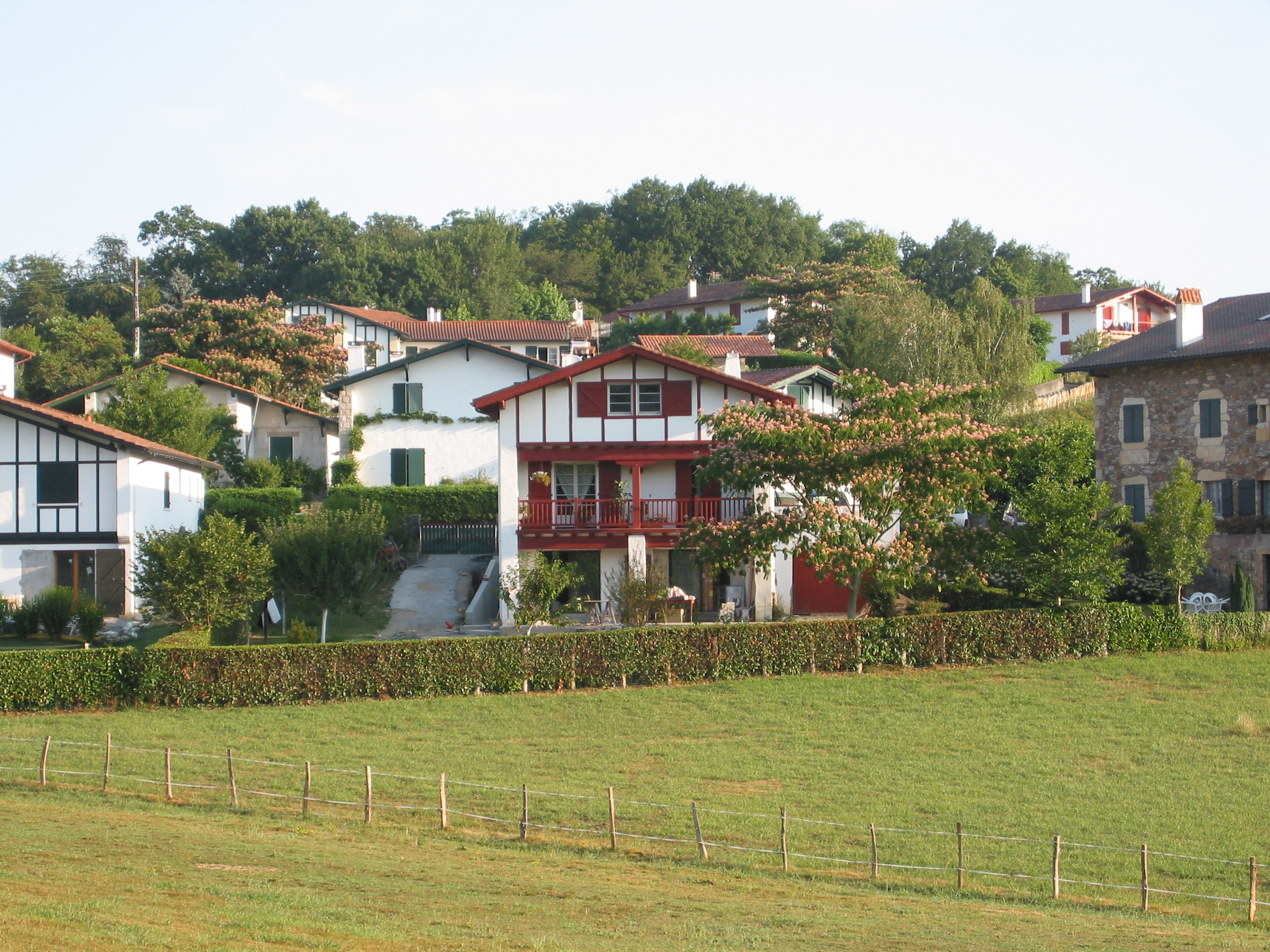 Sare (France), le village. Photo prise le 24/07/05 par Harrieta171